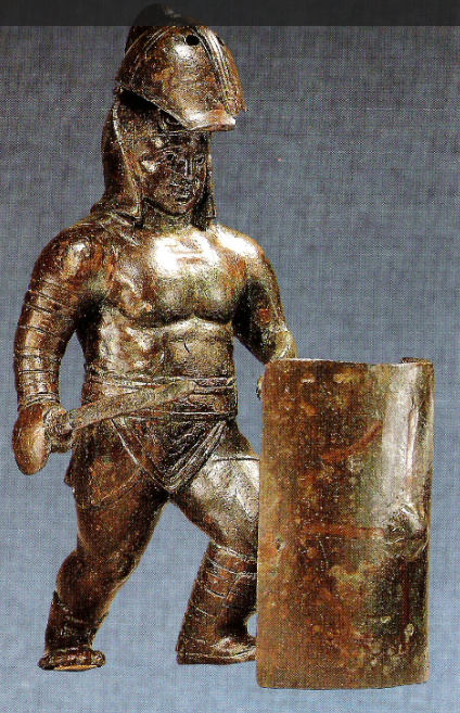 Statuette de secutor au Musée d'Arles